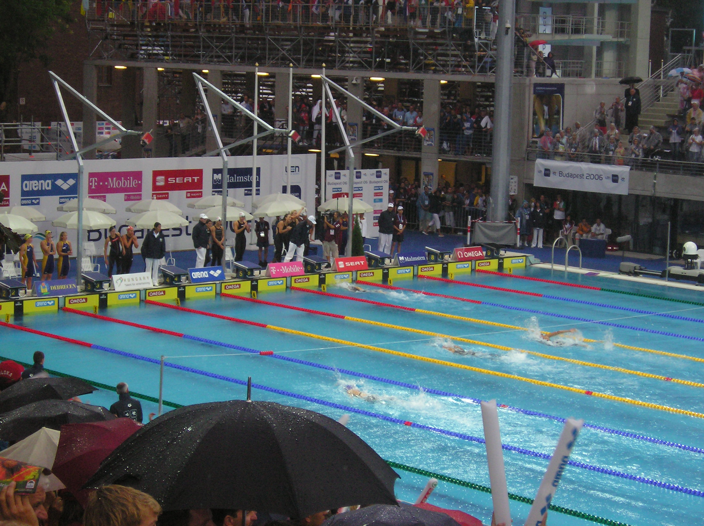 Finale 4 x 200 meter vrije slag vrouwen tijdens het EK Zwemmen 2006 in Boedapest.